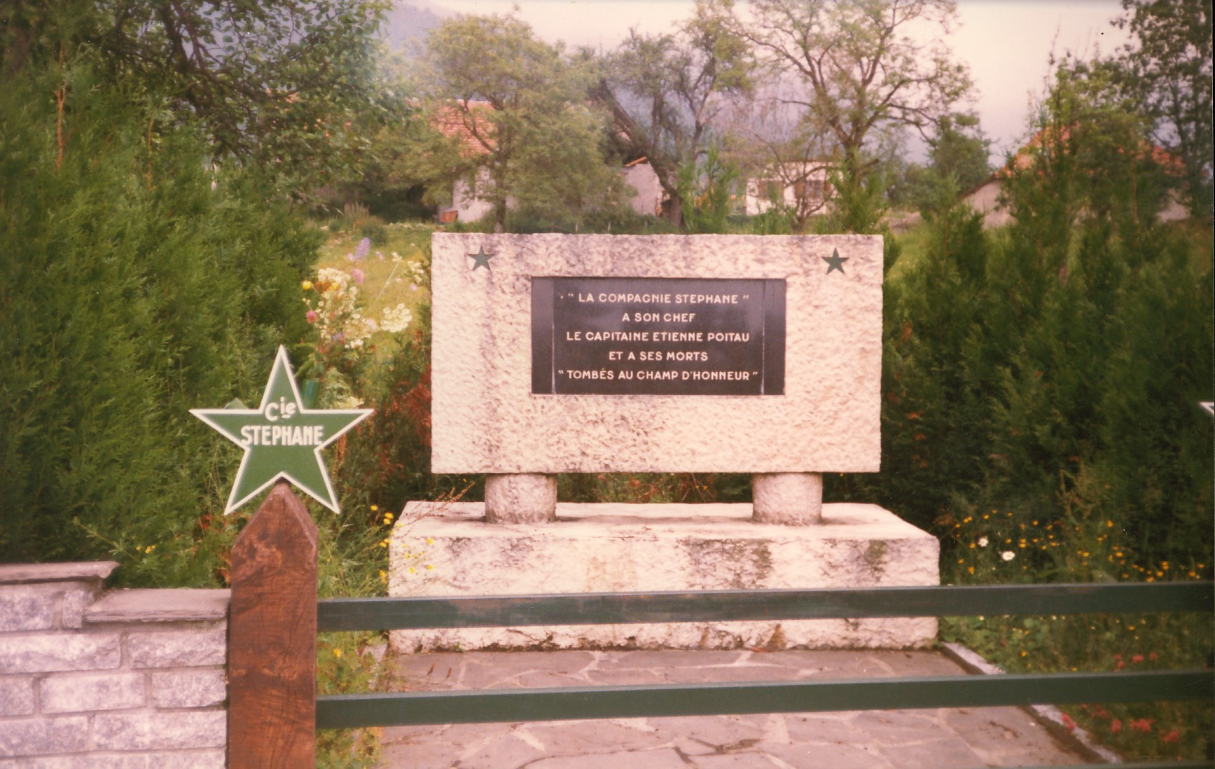 Monument commémoratif de la Compagnie Stéphane (Etienne Poitau) à Prabert dans le massif de Belledonne (Commune de Laval - Isére) (1988)